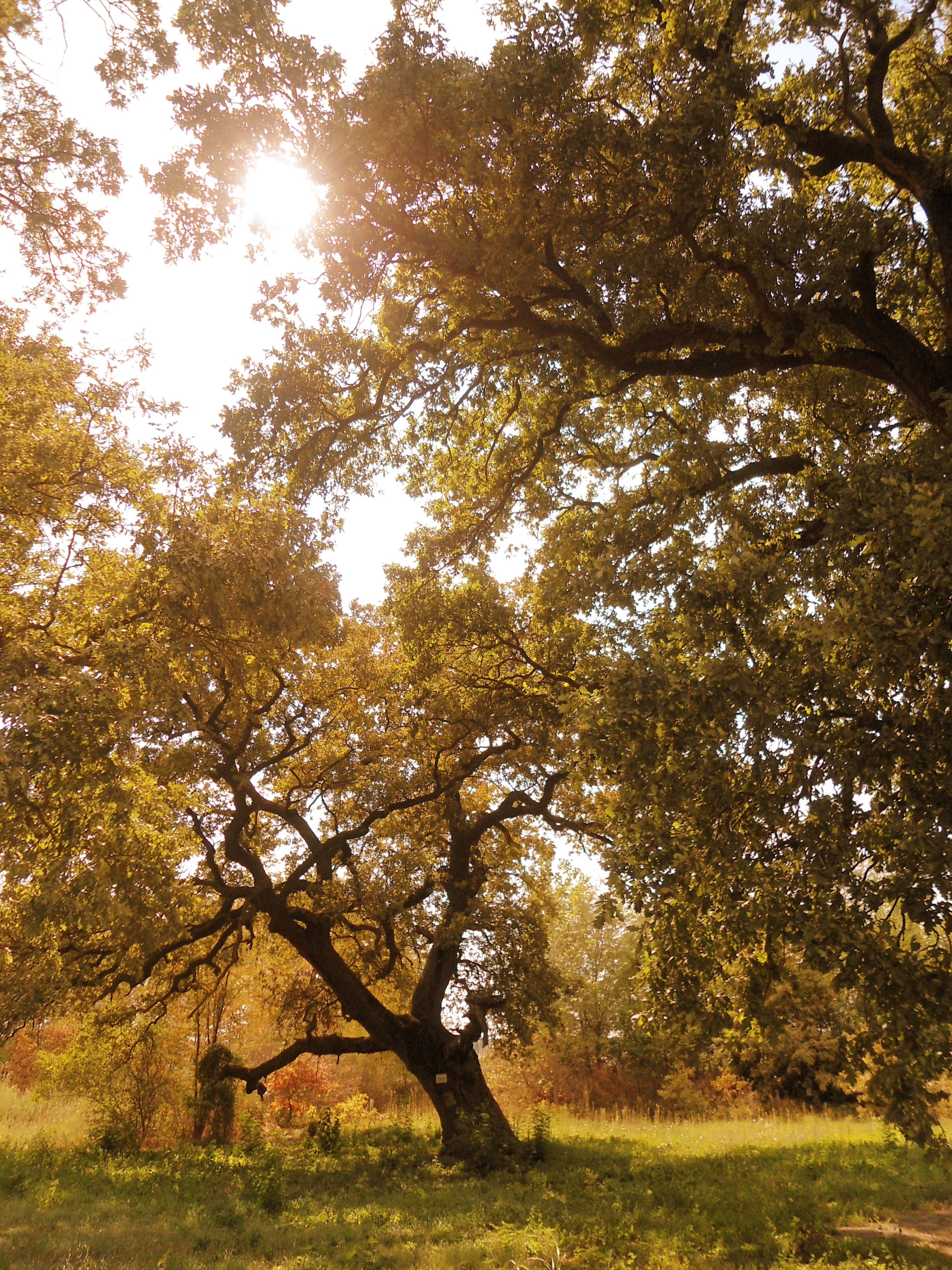 Вековни дъбове край село Коневец, северният край на резерват Горна Топчия. Вписани в регистъра на вековните дървета (448, 449, 450), на възраст между 300 и 400 г.